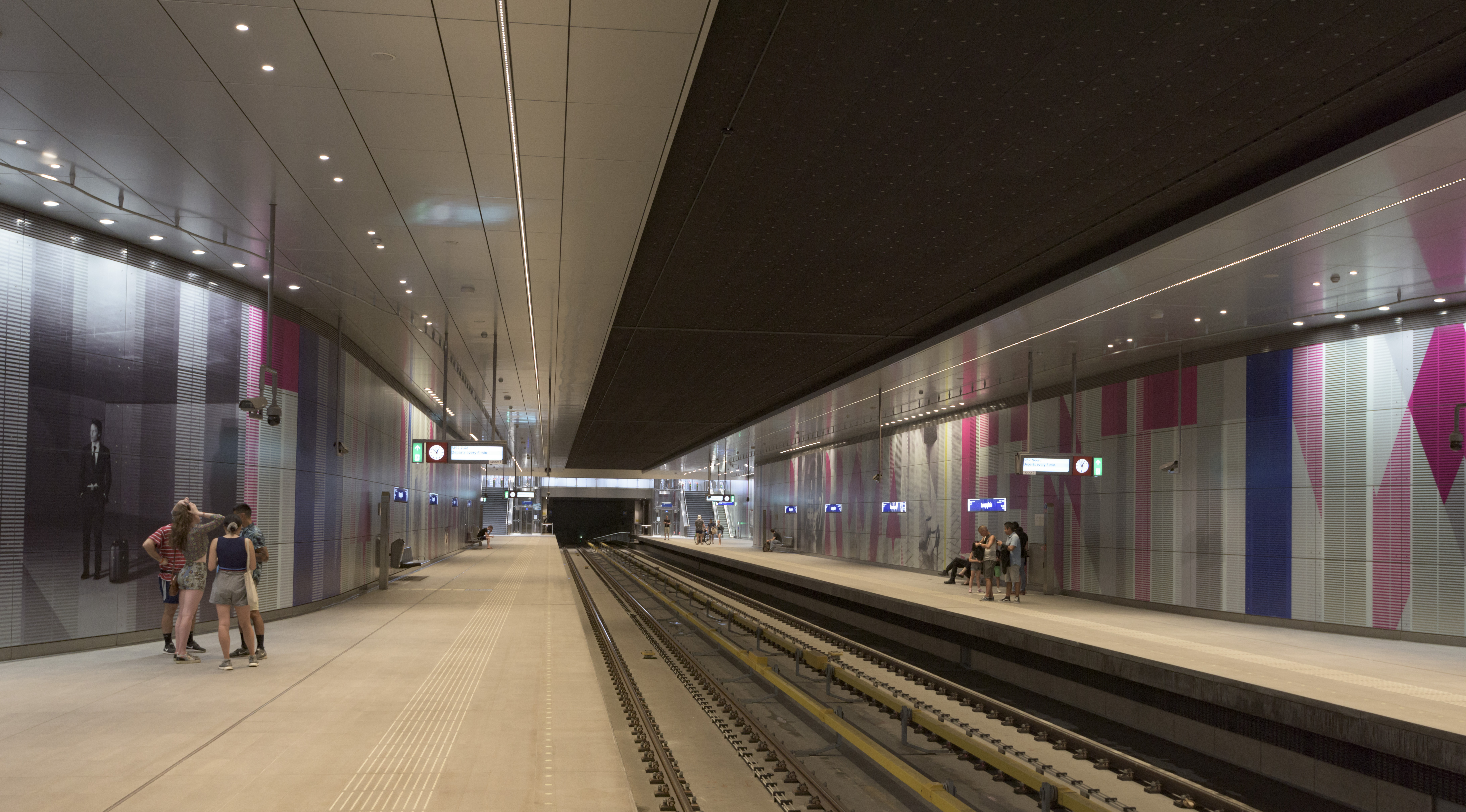 Metrostation Europaplein